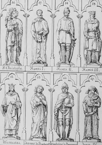 Monographie de l'Hôtel de ville de Louvain. Vervaardiger: Everaerts, Adolphe (tekenaar), Ickx, Ferdinand [fils] (drukker),Ickx [veuve] (drukker) Leuven, 1872